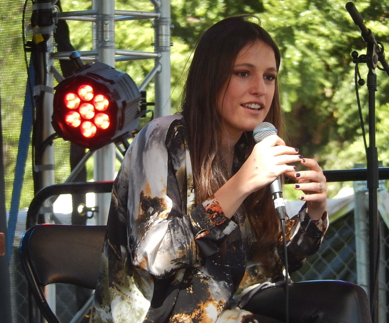 A cantora portuguesa Carminho durante apresentação no Festival WOMADelaide, em 2014.